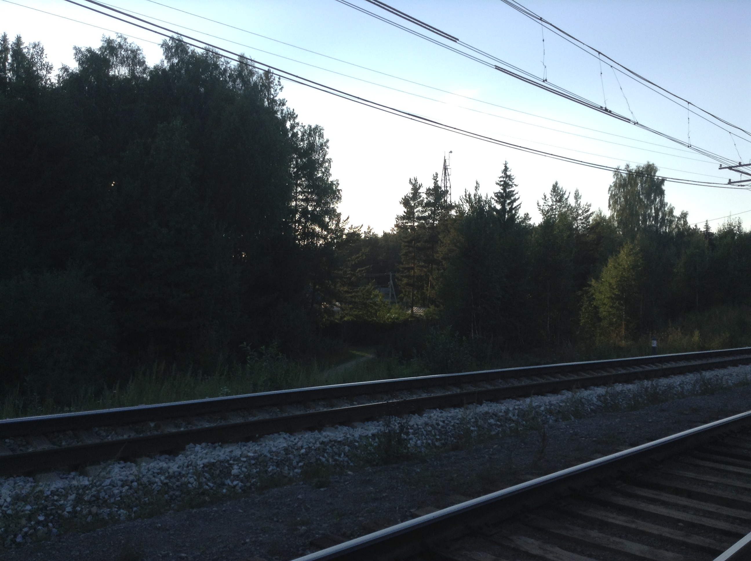 ЖД линия, лесной пейзаж